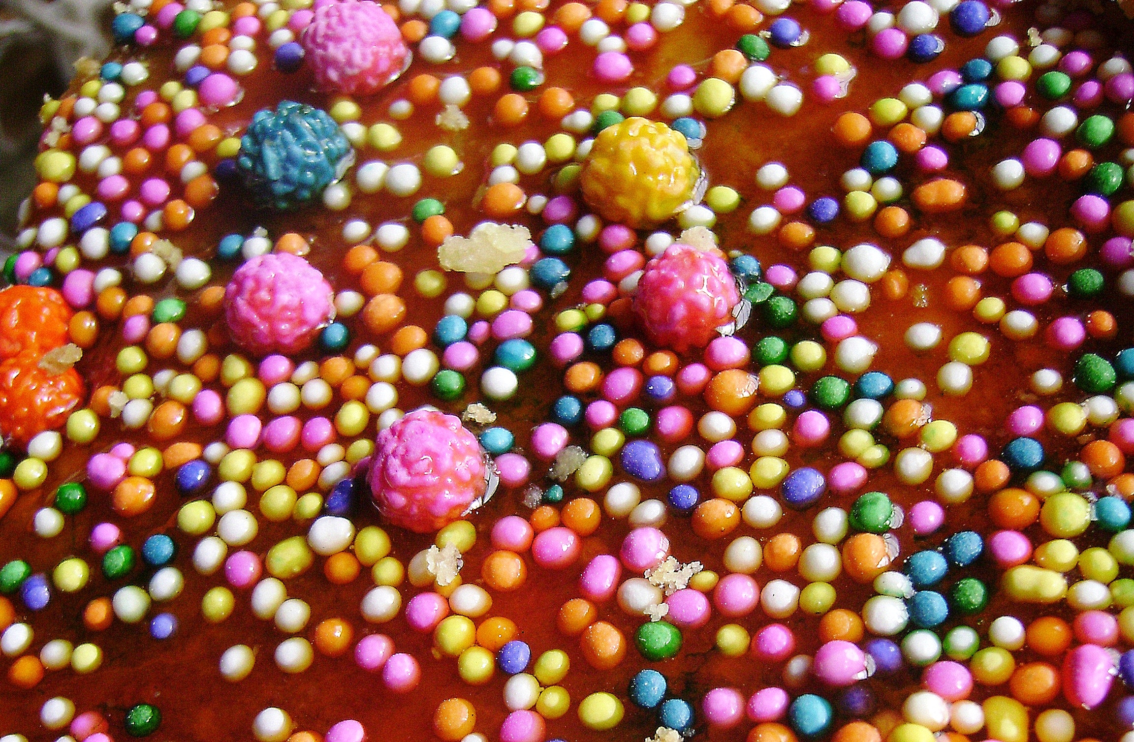 Turrón de doña Pepa. Lima-Perú.